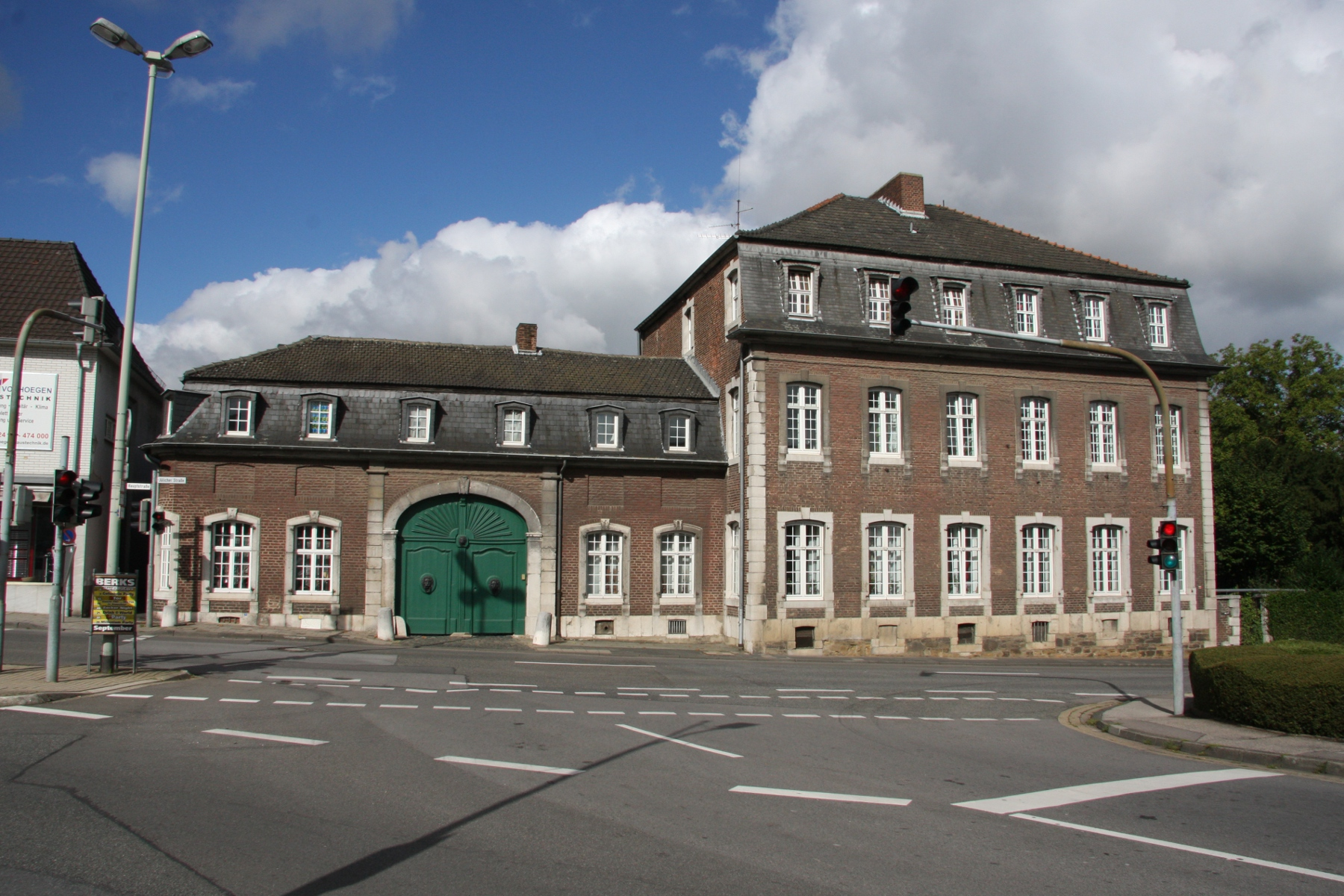 Baudenkmal Würselen, Jülicher Straße 1-3